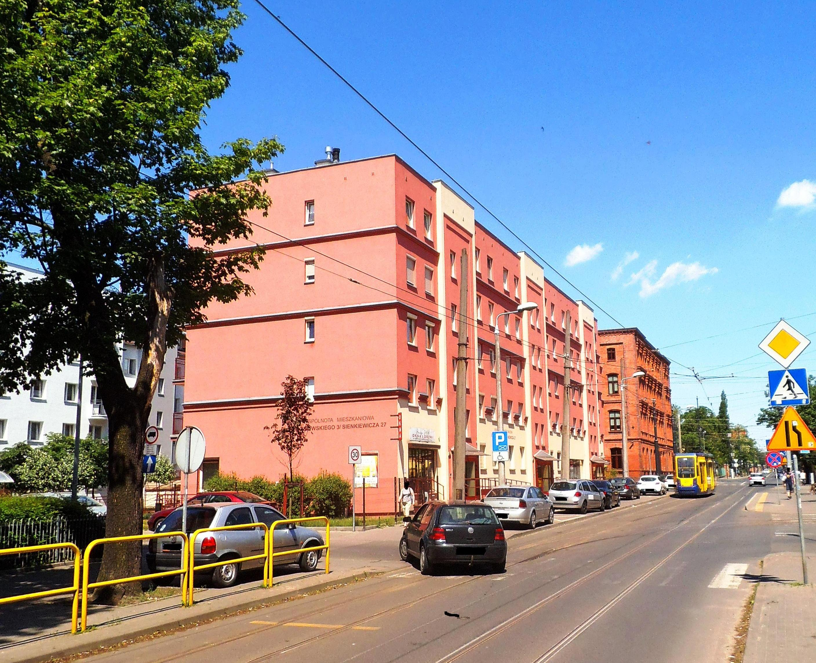 Ulica Sienkiewicza w Toruniu22